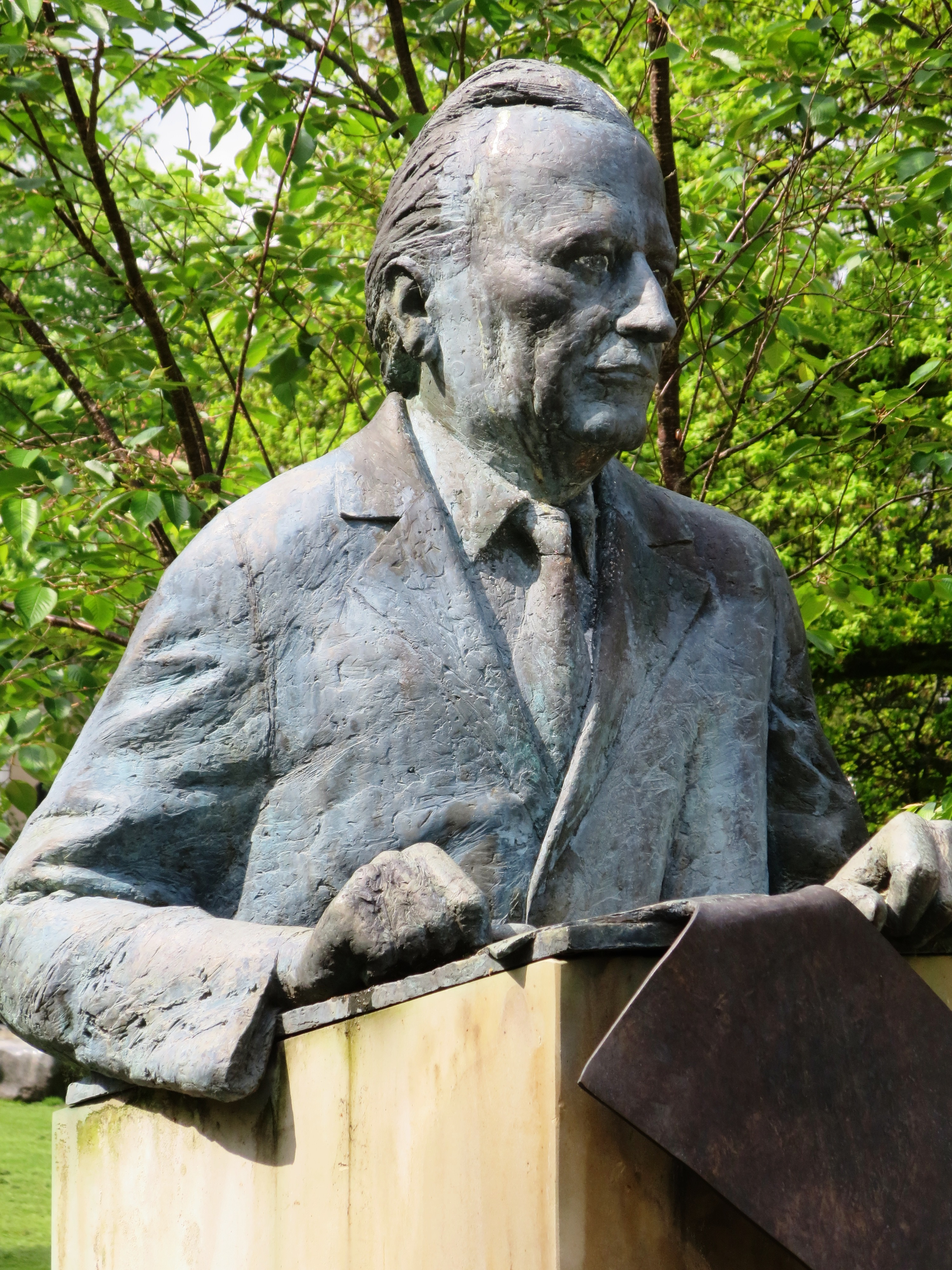 Christa Baumgärtel, "Karl Jaspers", 1983, Bronzeplastik auf Sandsteinsockel, Büste auf dem Cäcilienplatz in Oldenburg